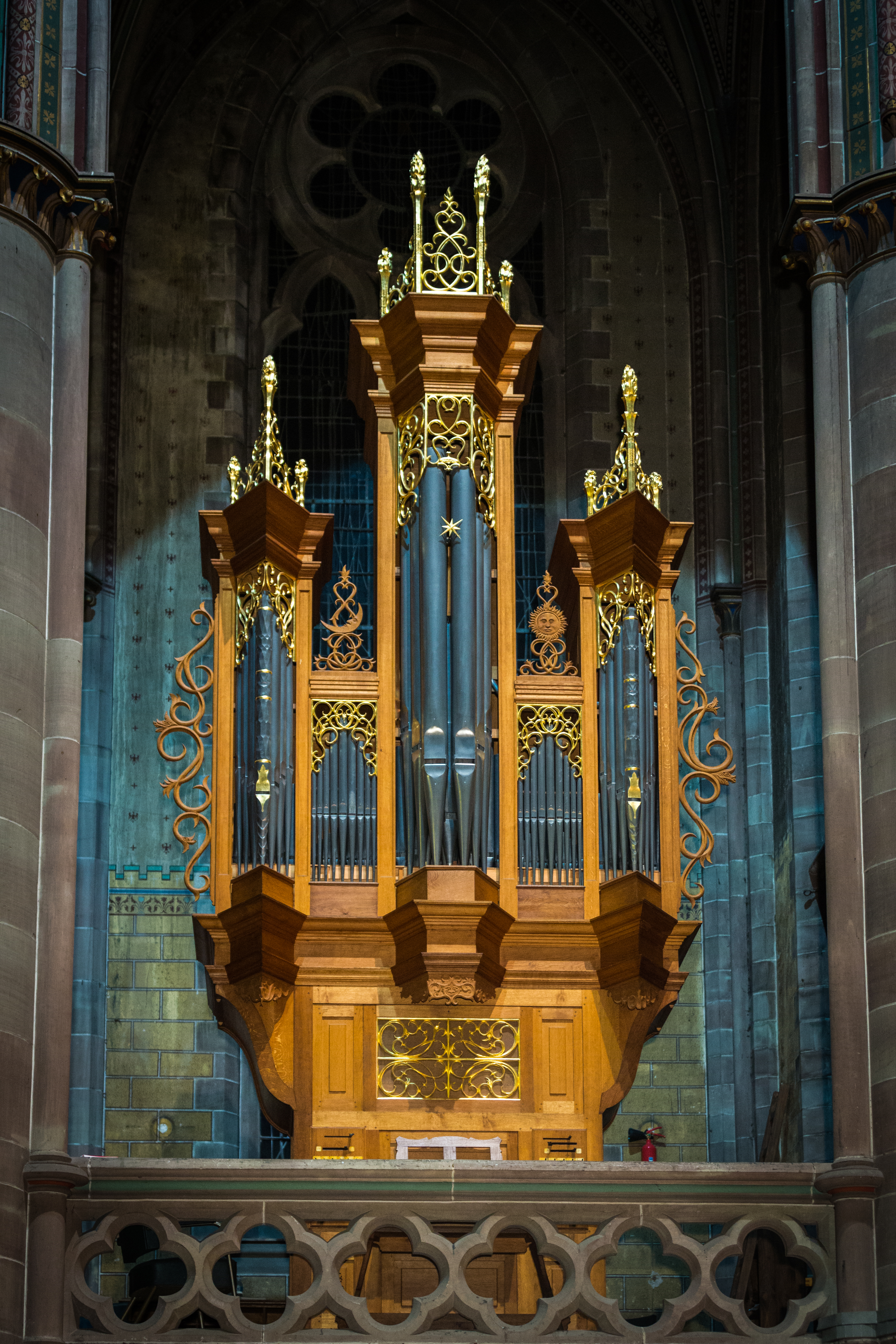 Strasbourg église Saint-Paul 9 novembre 2013. Orgue de chœur Garnier (1976)